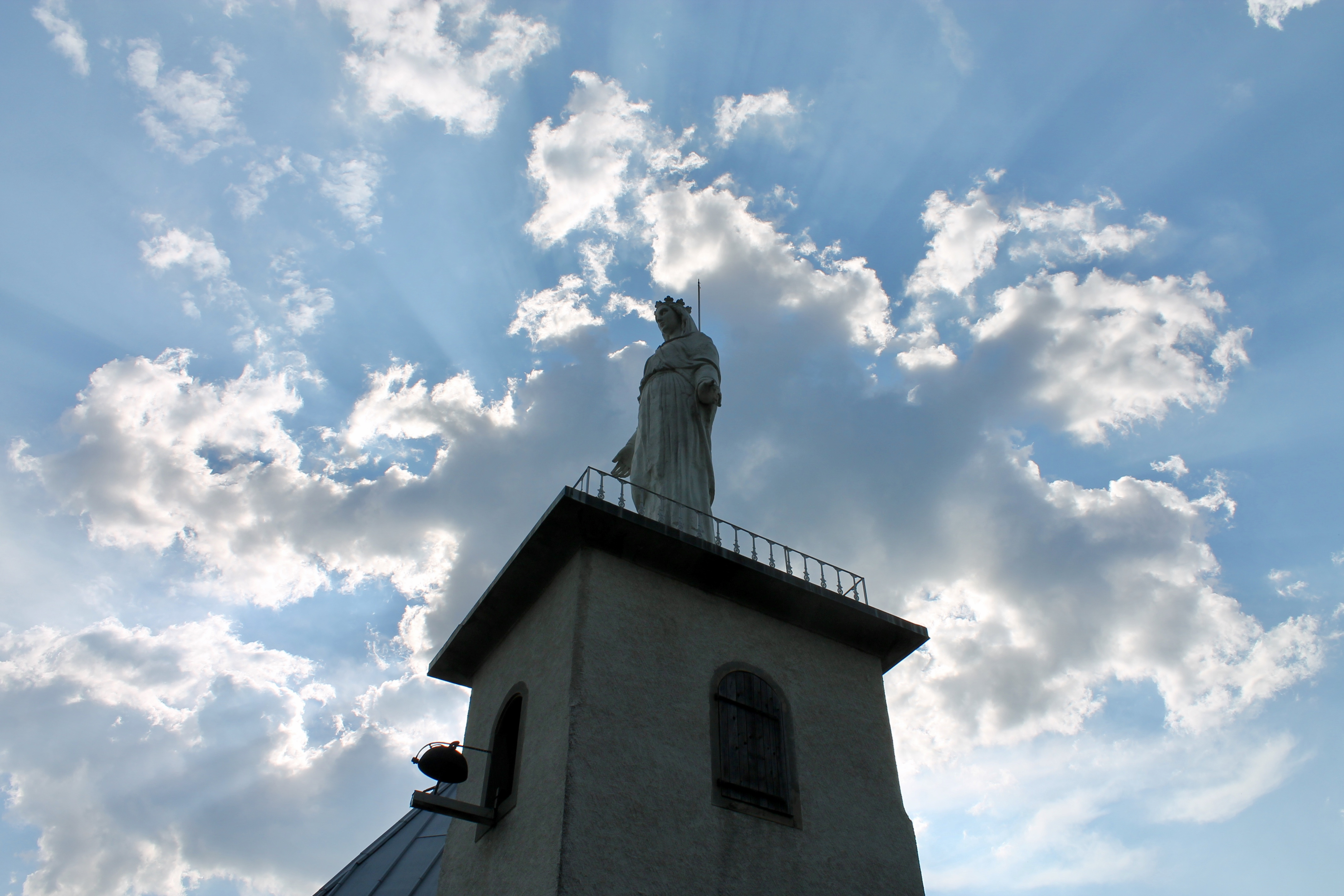 Chapelle Notre-Dame-des-Neiges (juillet 2018).